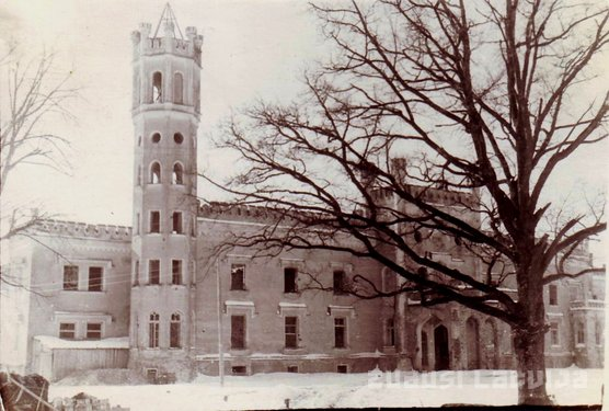 1905. gada nemieros lepnā pils tika nodedzināta